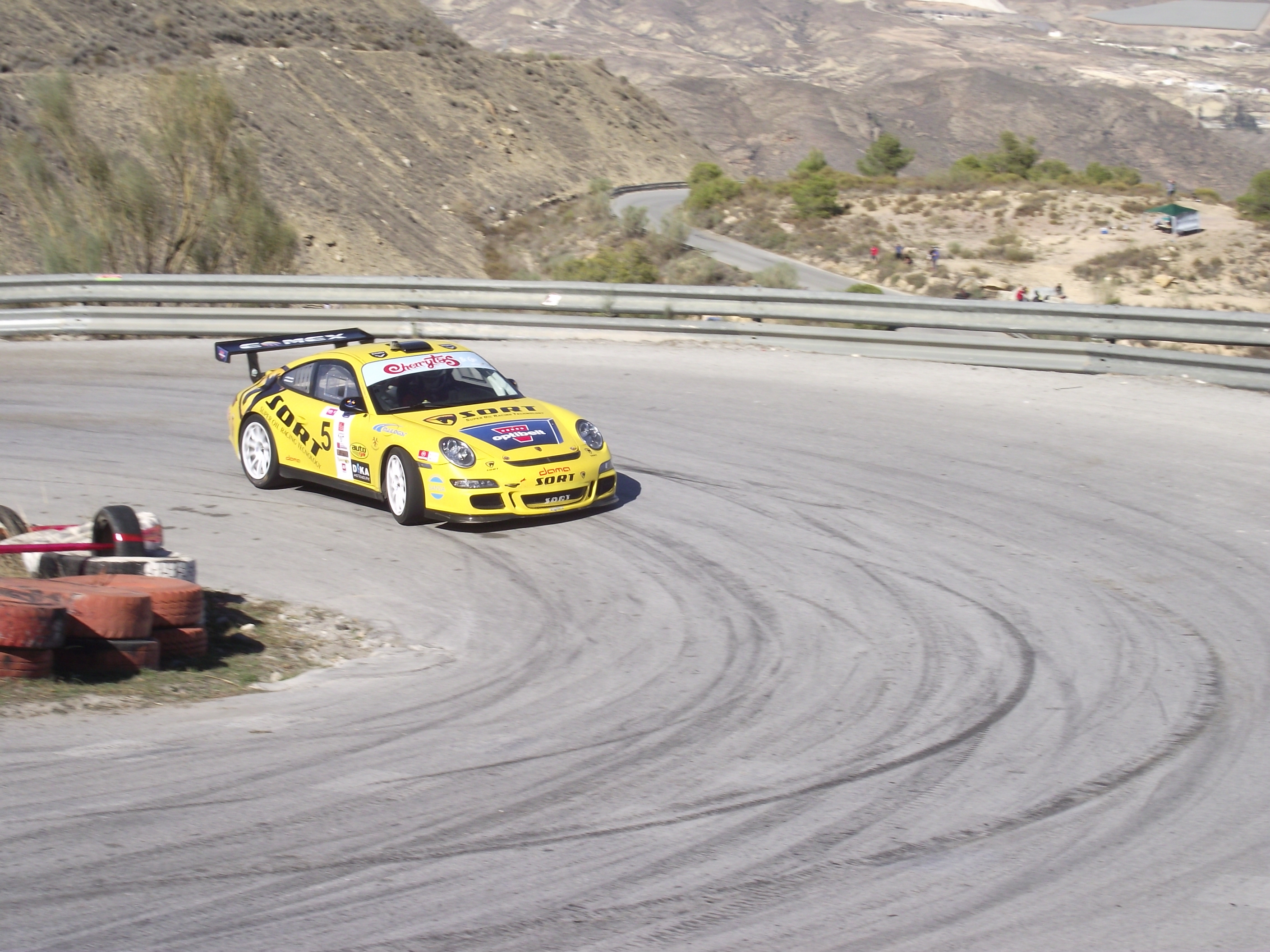 Maldonado, subida al Mármol de Macael 2016